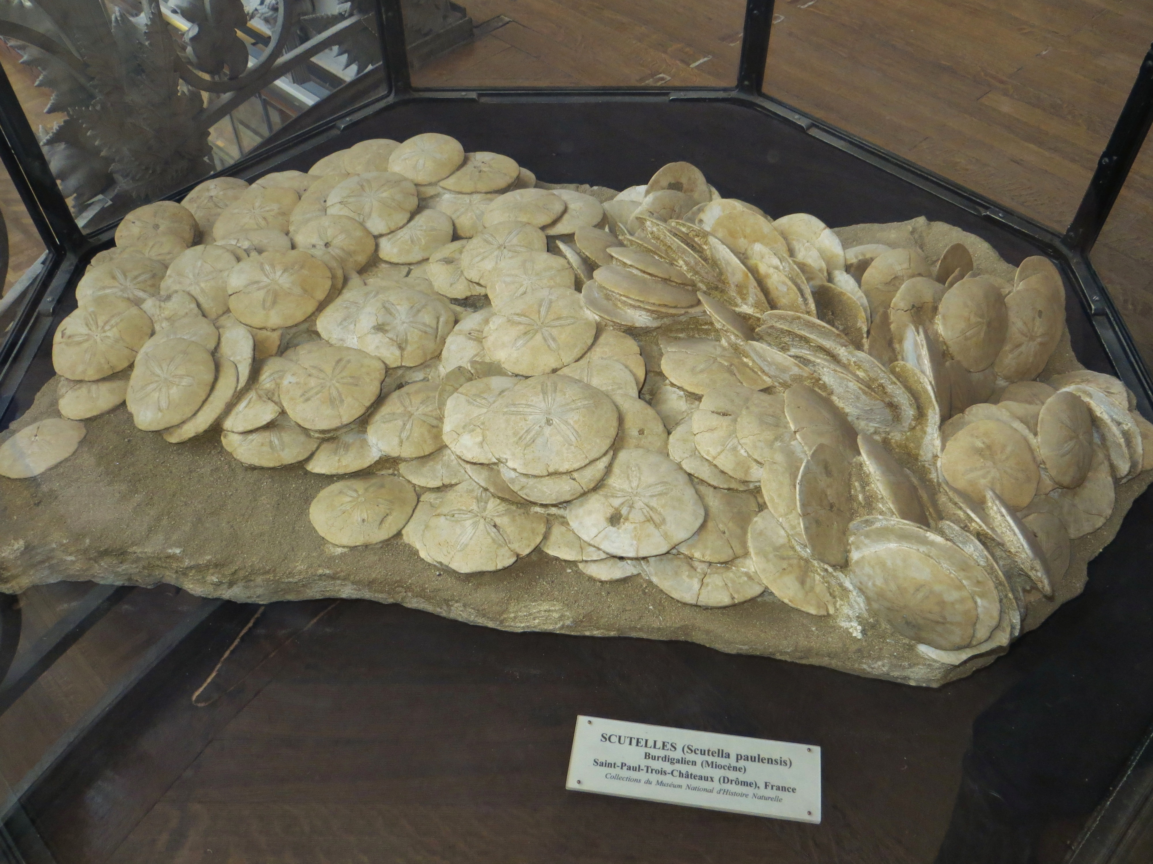 Agrégation de fossiles de Scutella paulensis (oursins plats, MNHN).